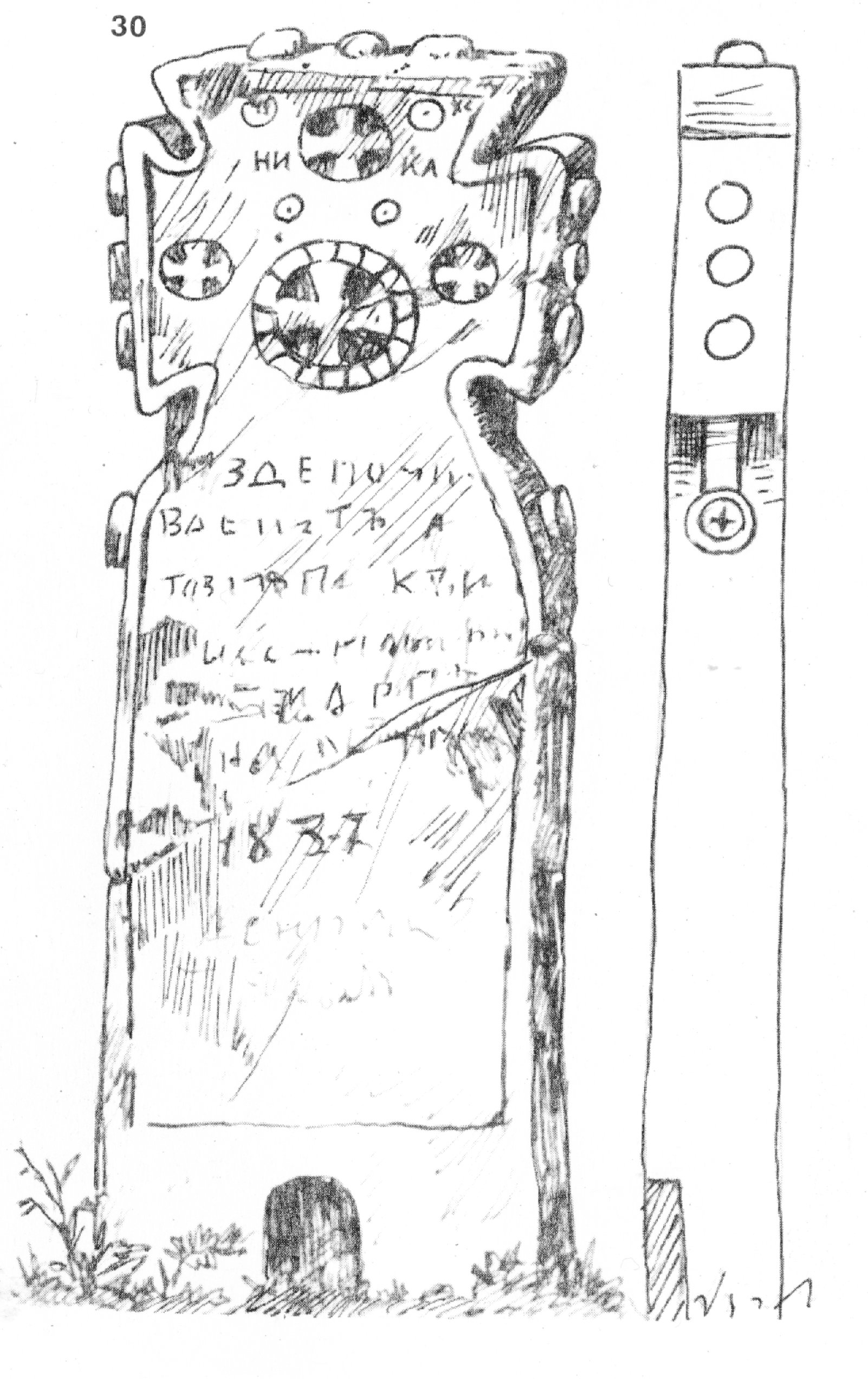 30. Кръст - надгробен паметник, из Белоградчишките гробища; 1837г. Четирикрилен. Горните три крила са трапецовидни и завършват с по три ябълки. На лицето му са гравирани надпис и дата, орнаменти и равнокрилни кръстчета в кръгове. Върху долното крило е издълбана ниша за кандило. Размери: 165x79x20. Изработен е грубо от бял пясъчник. Скициран на 10.VIII 1930 г. (Т. 13, обр. 112.)